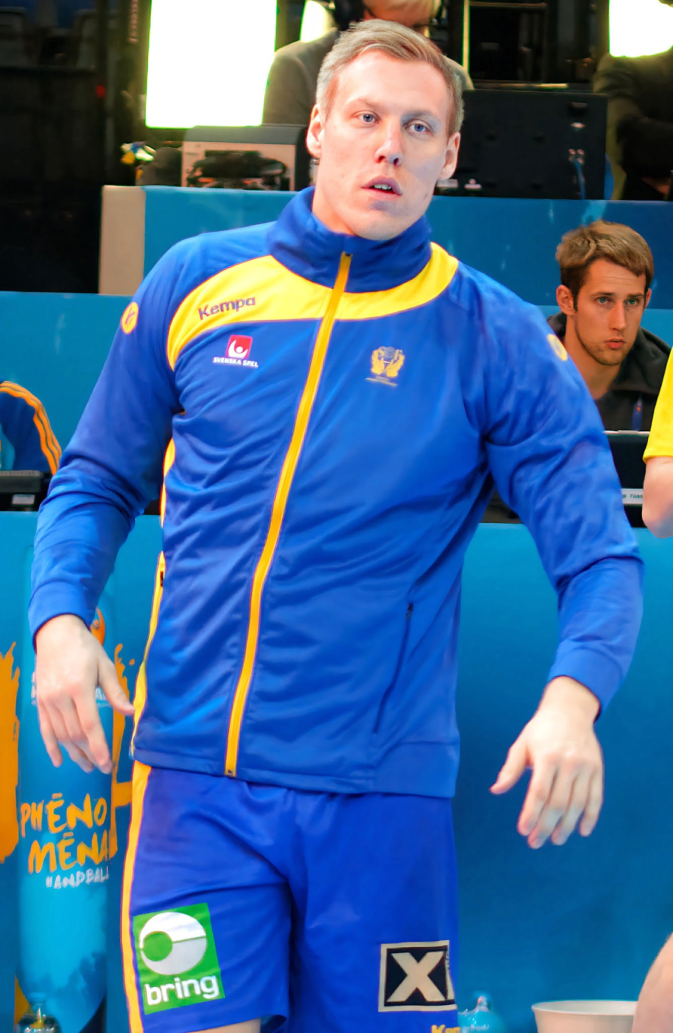 Match de la phase préliminaire du championnat du monde masculin de handball 2017 entre la Suède et le Danemark (Groupe D). A Bercy, le 16 janvier 2017.